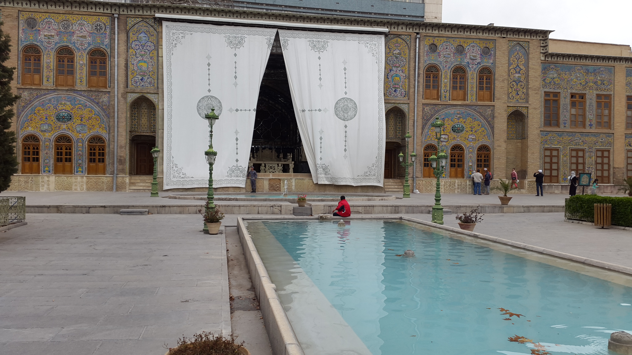 ایوان تخت مرمر